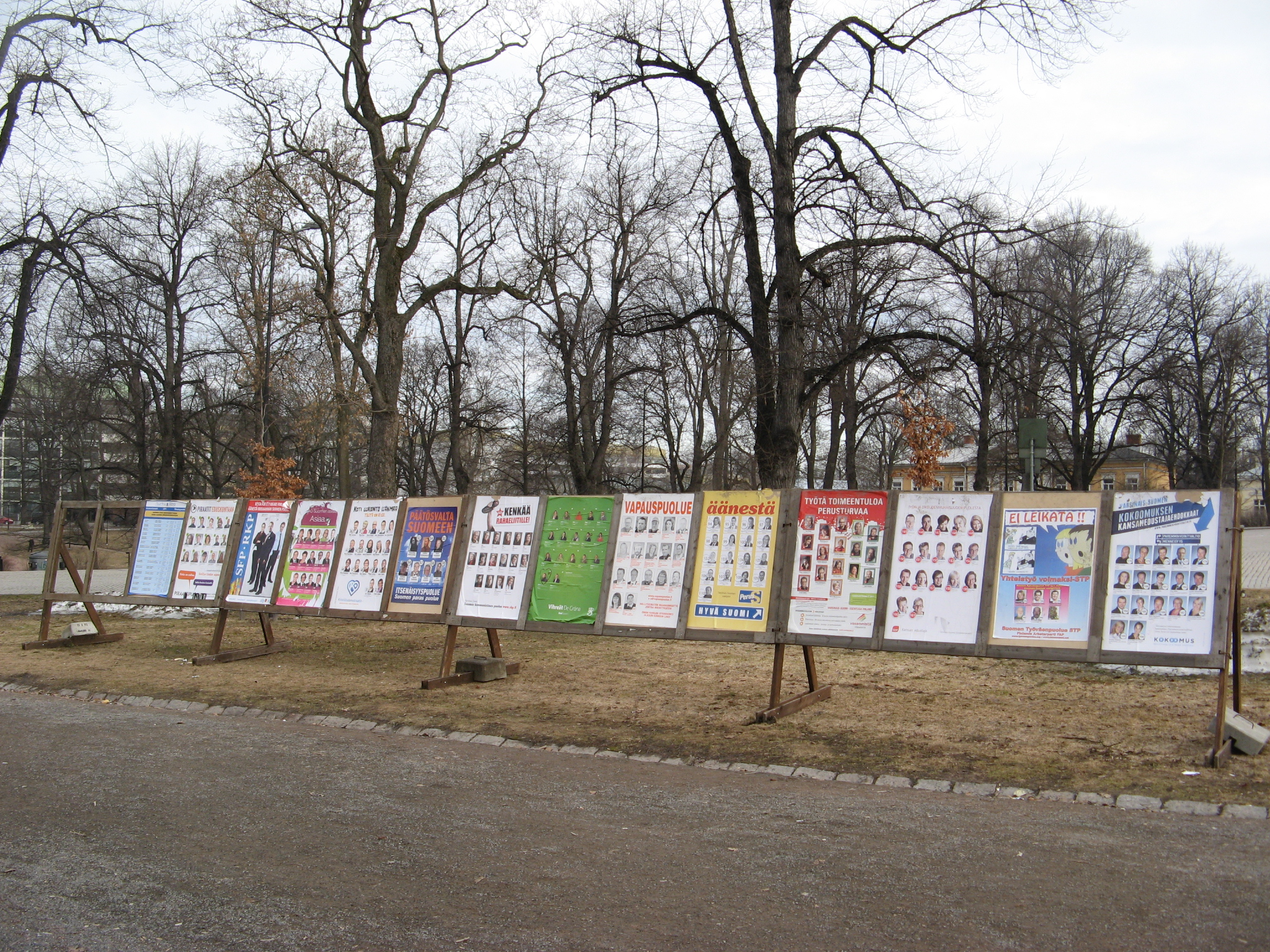 Kommunala ställningar för valreklam inför riksdagsvalet 2011 i Finland i Braheskvären i Åbo. Affischen längst till vänster ger information om vallokaler och röstningstider.